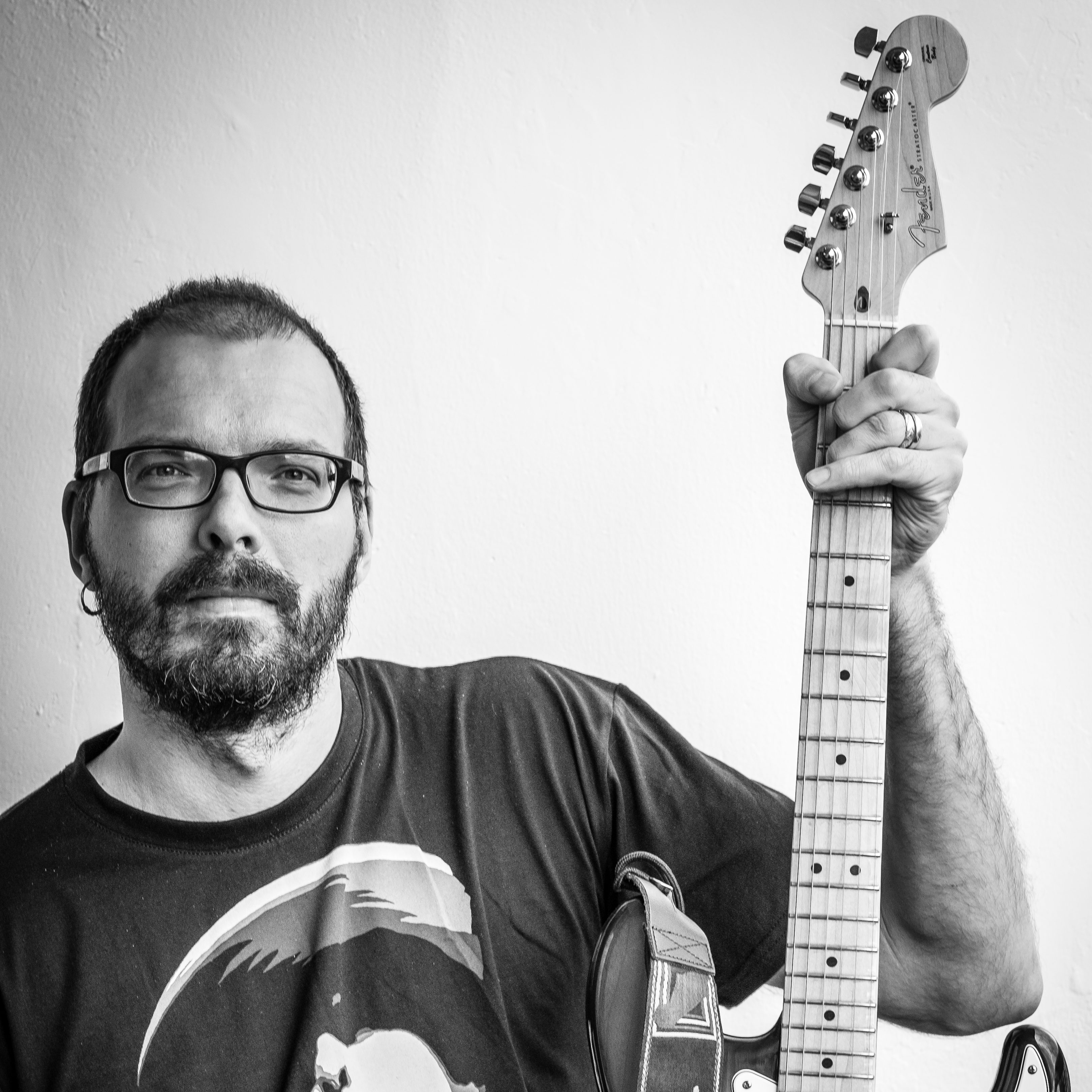 Tommy Jensen in Krakow